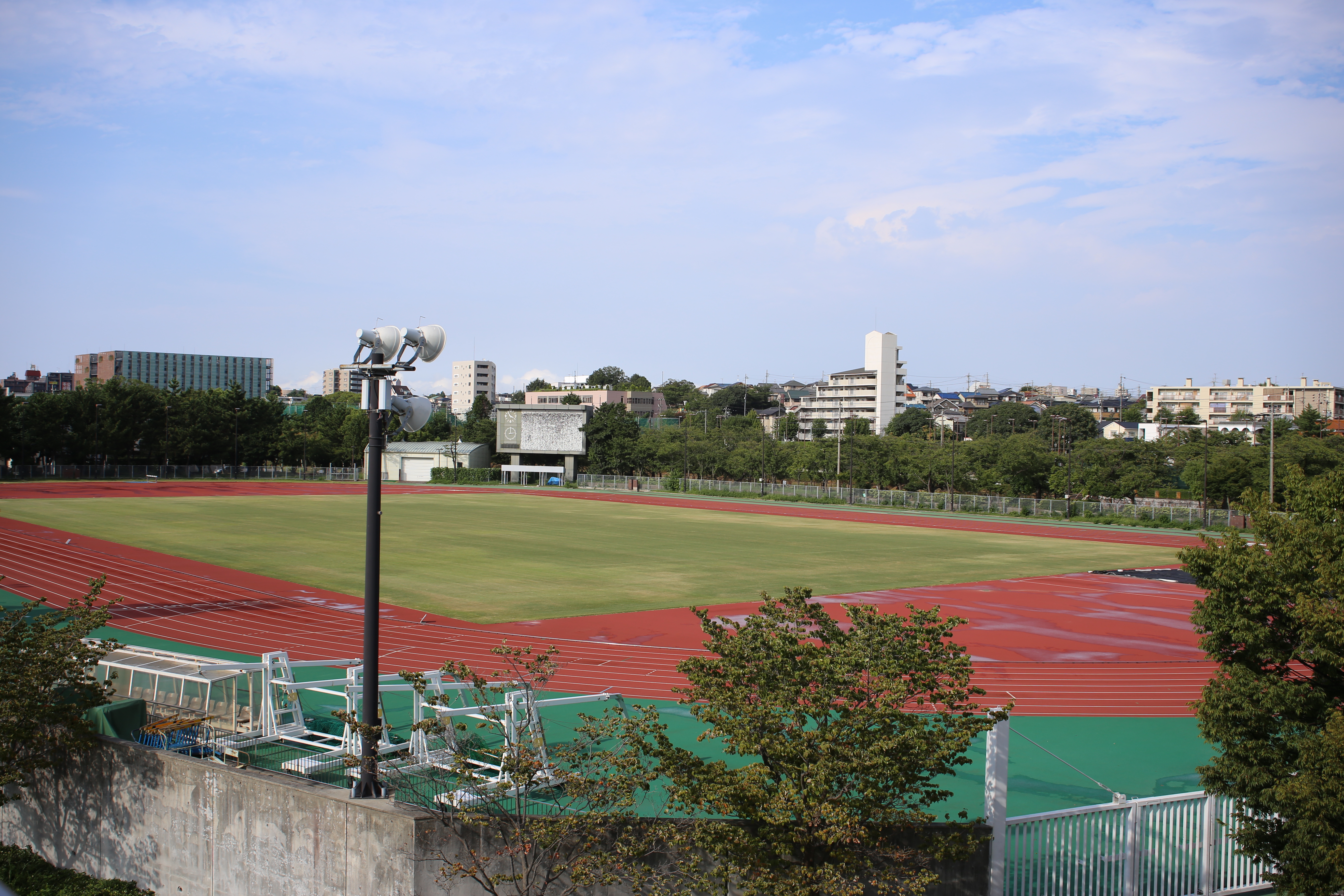 名古屋市瑞穂区の瑞穂公園北陸上競技場